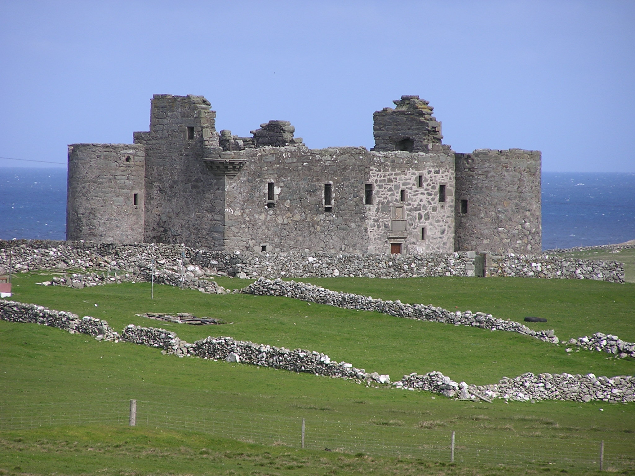 Ruine des Muness Castle auf Unst, Shetland